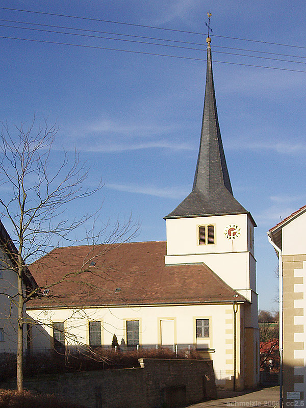 Evangelische Pfarrkirche in Heilbronn-Biberach